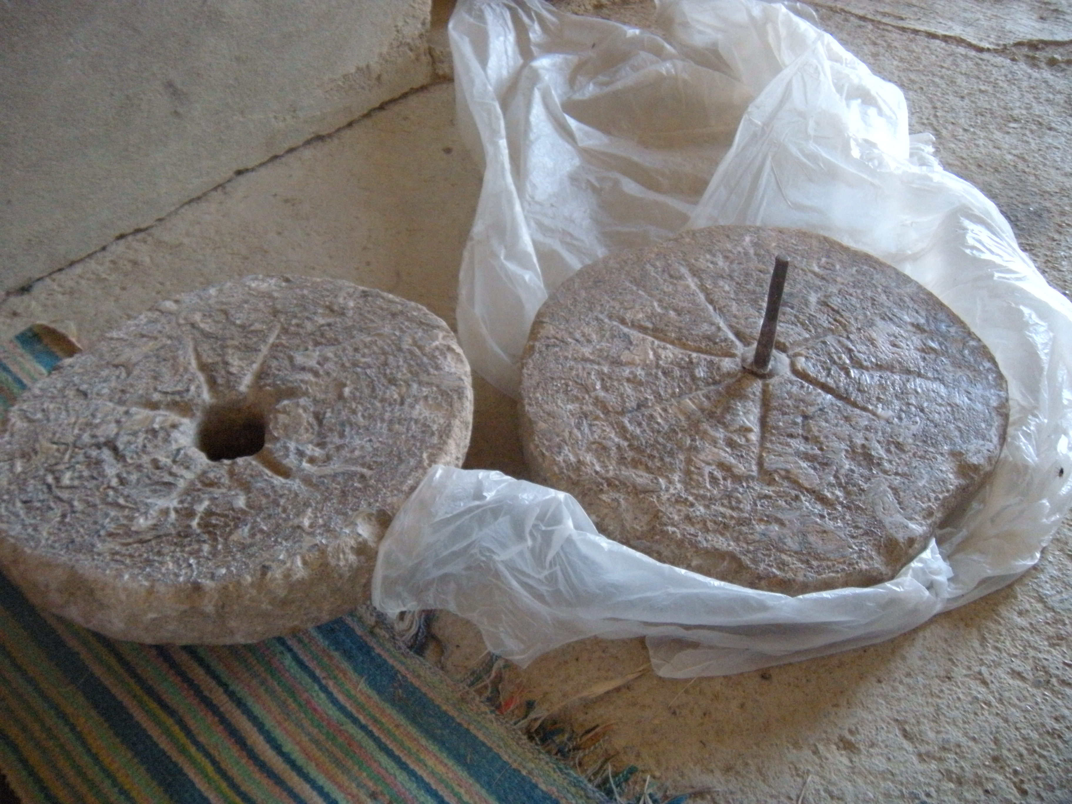 Adirt ou Meule chaoui dans les Aurès en Algérie